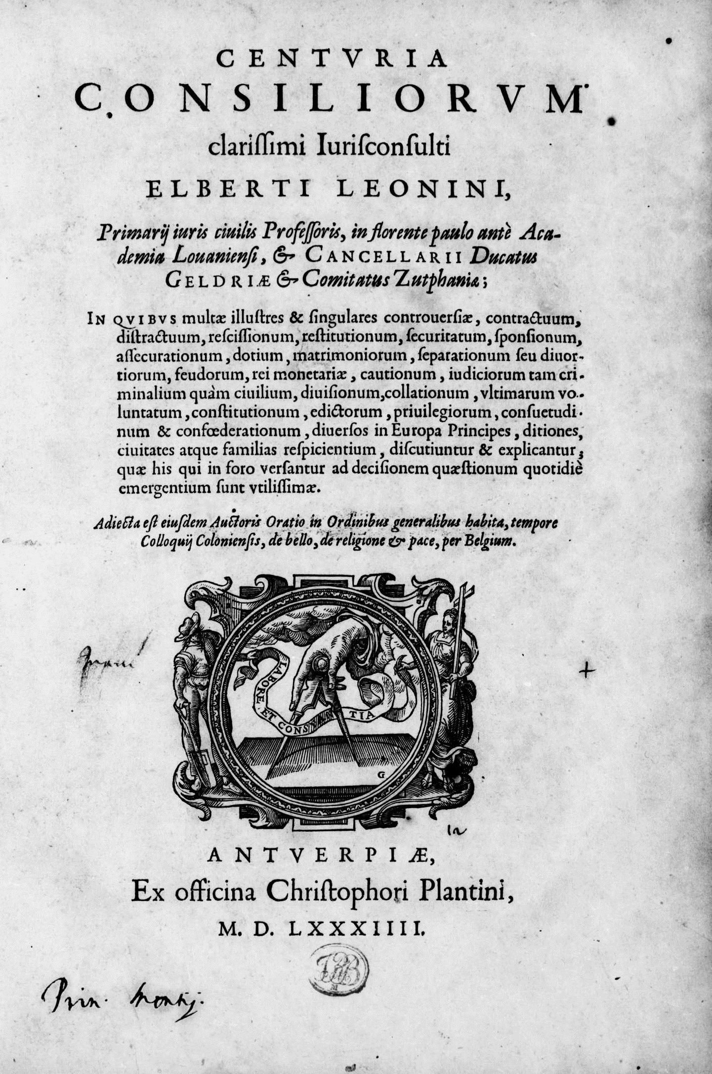 Frontespizio